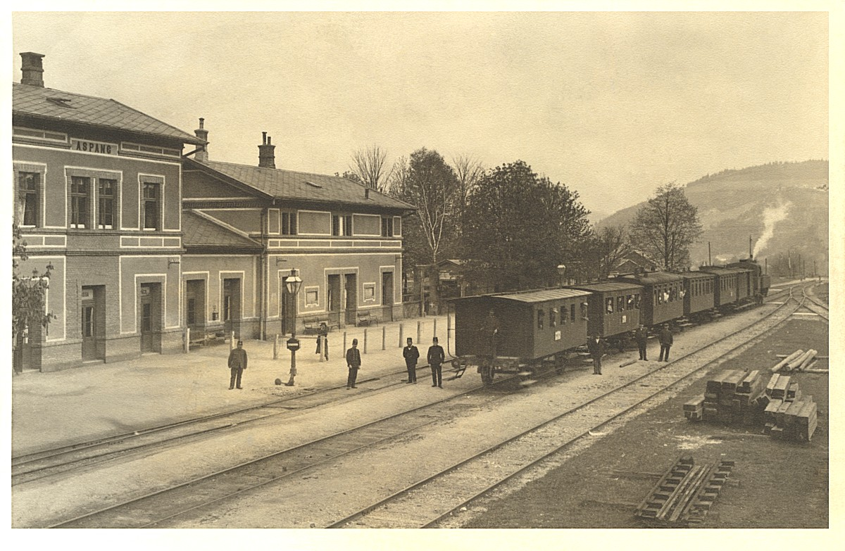 Aspang állomás 1885-ben (Ausztria)